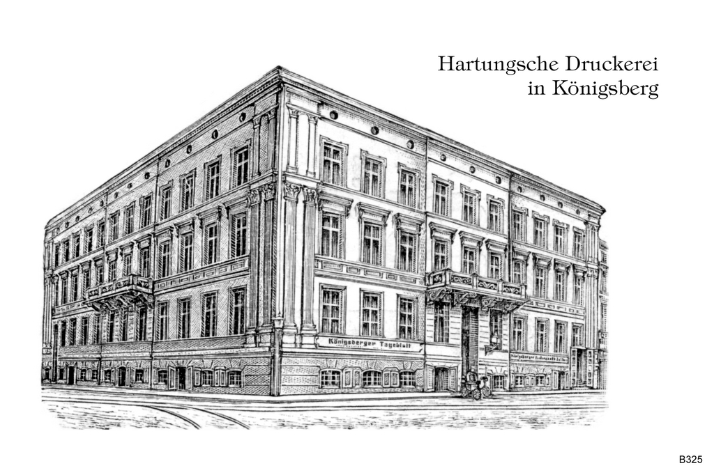 Hartungsche Drucker in Königsberg